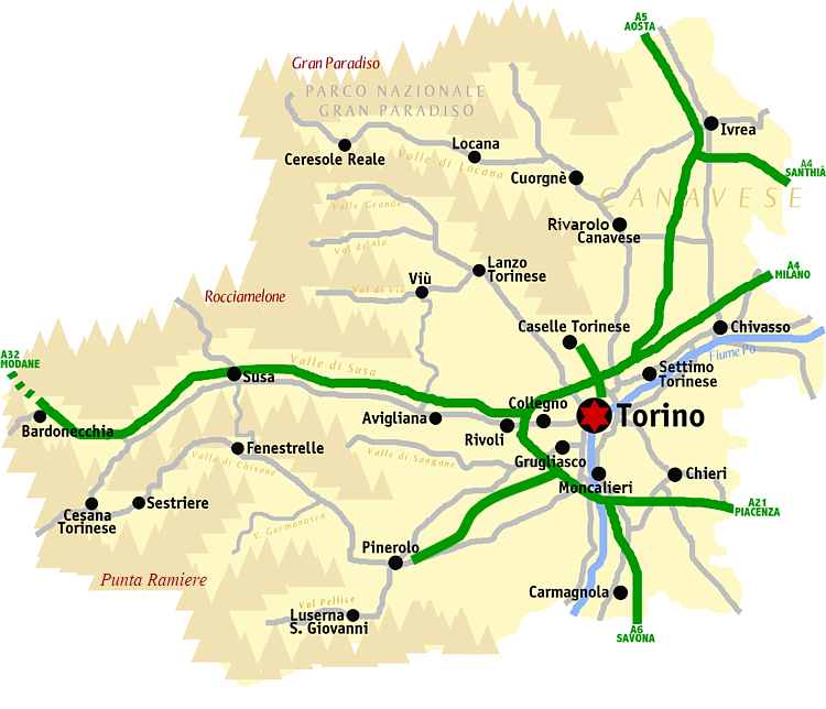 Mappa della provincia di Torino